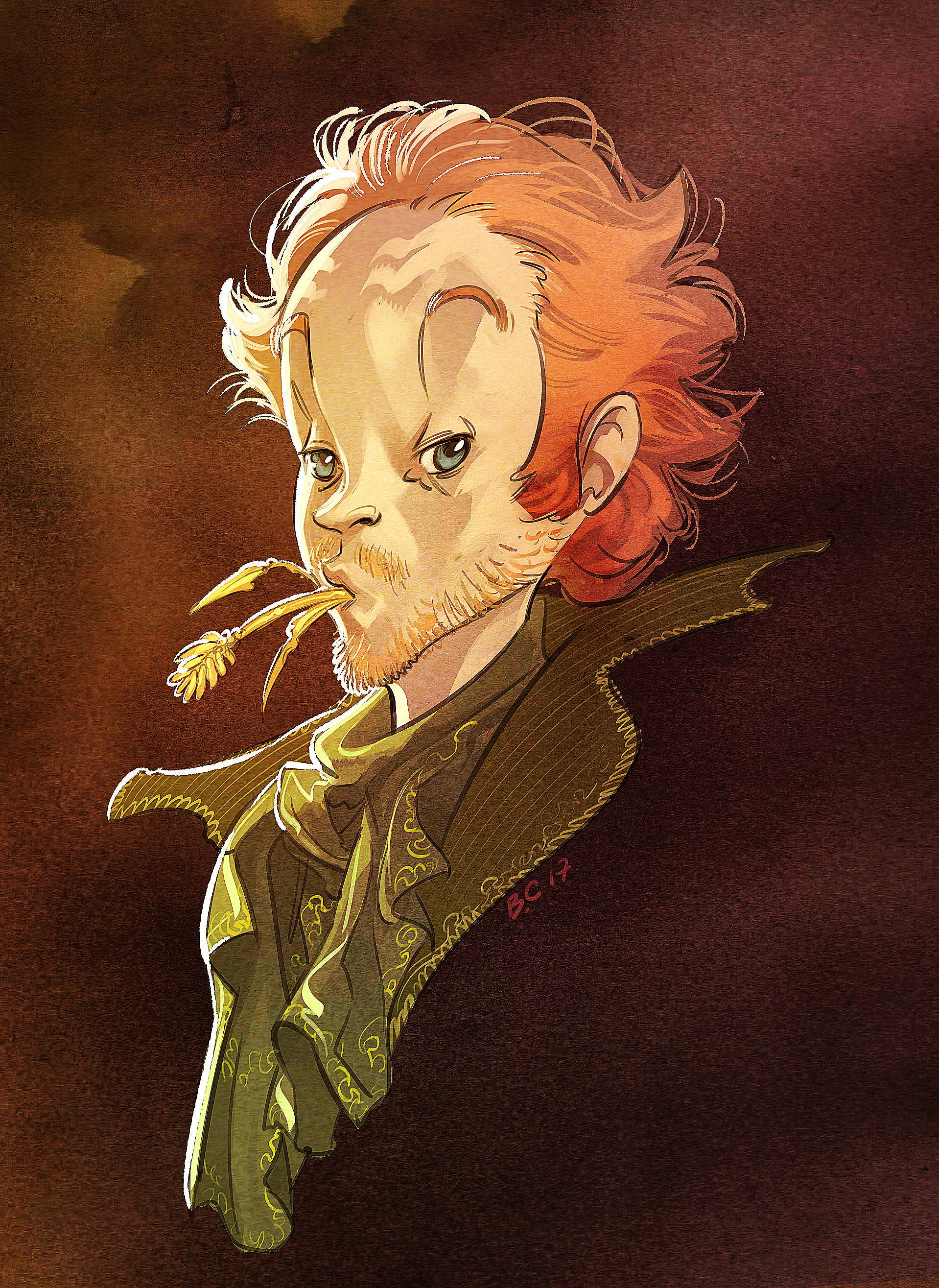 Dessin de Brice Cossu représentant Olivier Bocquet.